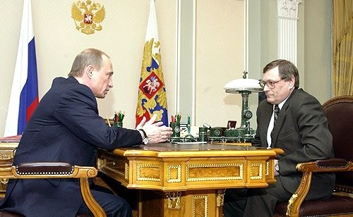 Владимир Путин встретился с Владимиром Чамовым, назначенным послом России в Ираке